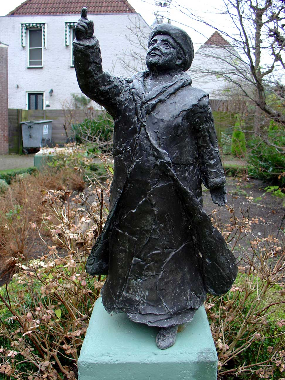 Replica Koningin Wilhelmina (1984) door Carol Cairns-van den Boom geplaatst in de tuin van het Verzetsmuseum Gouda